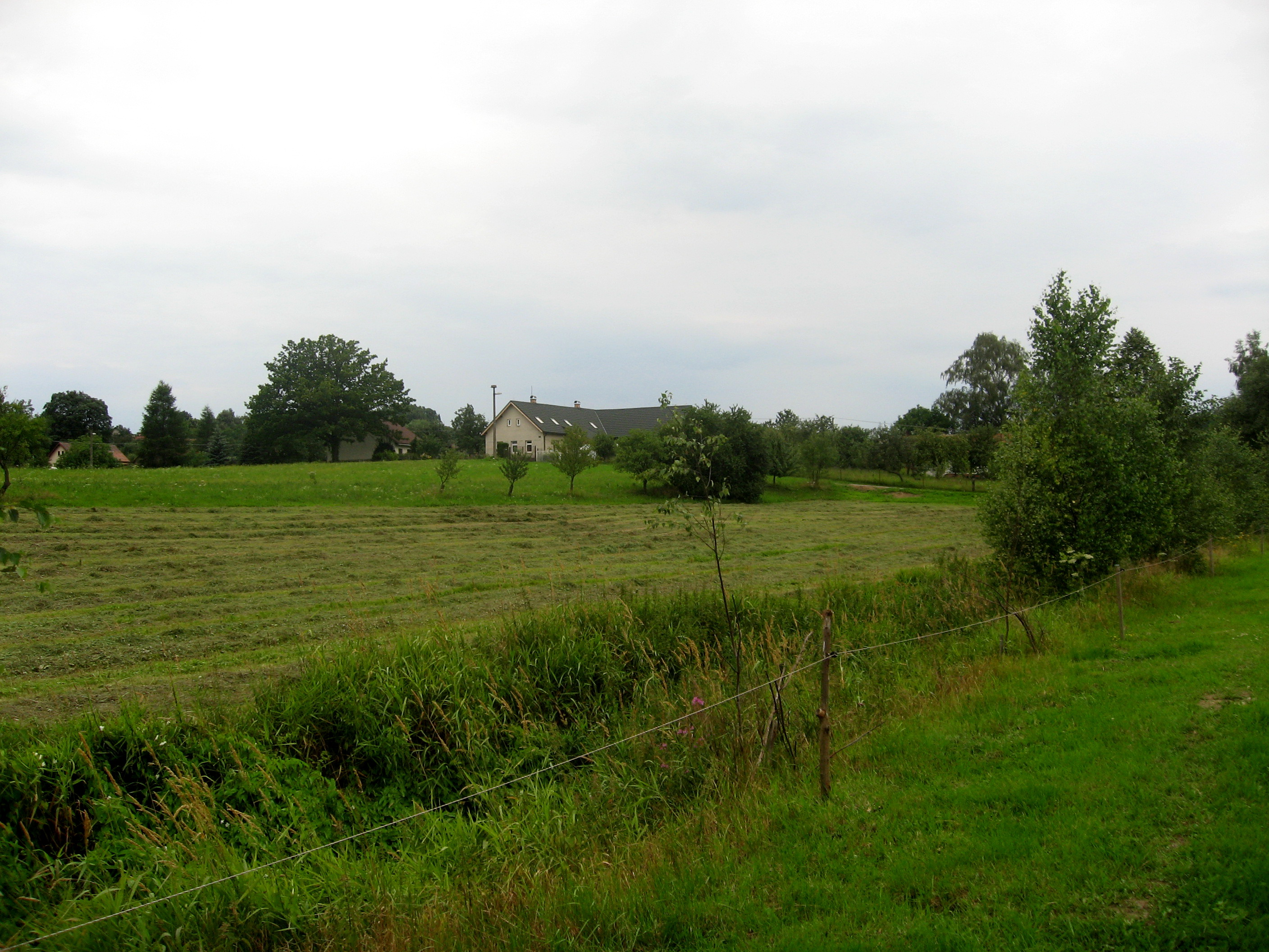 Boňkovský potok